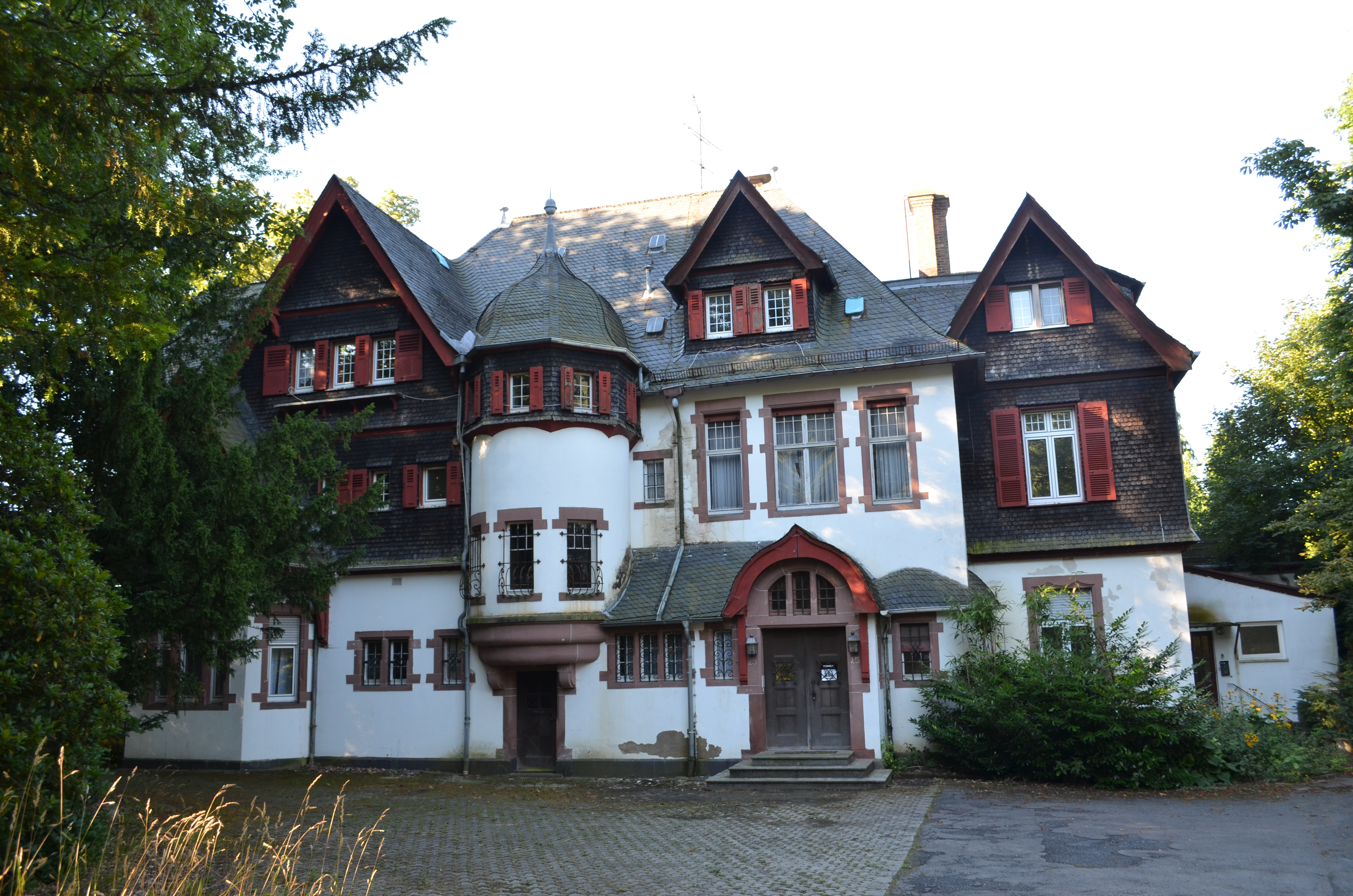 Falkenstein, Villa Rehe